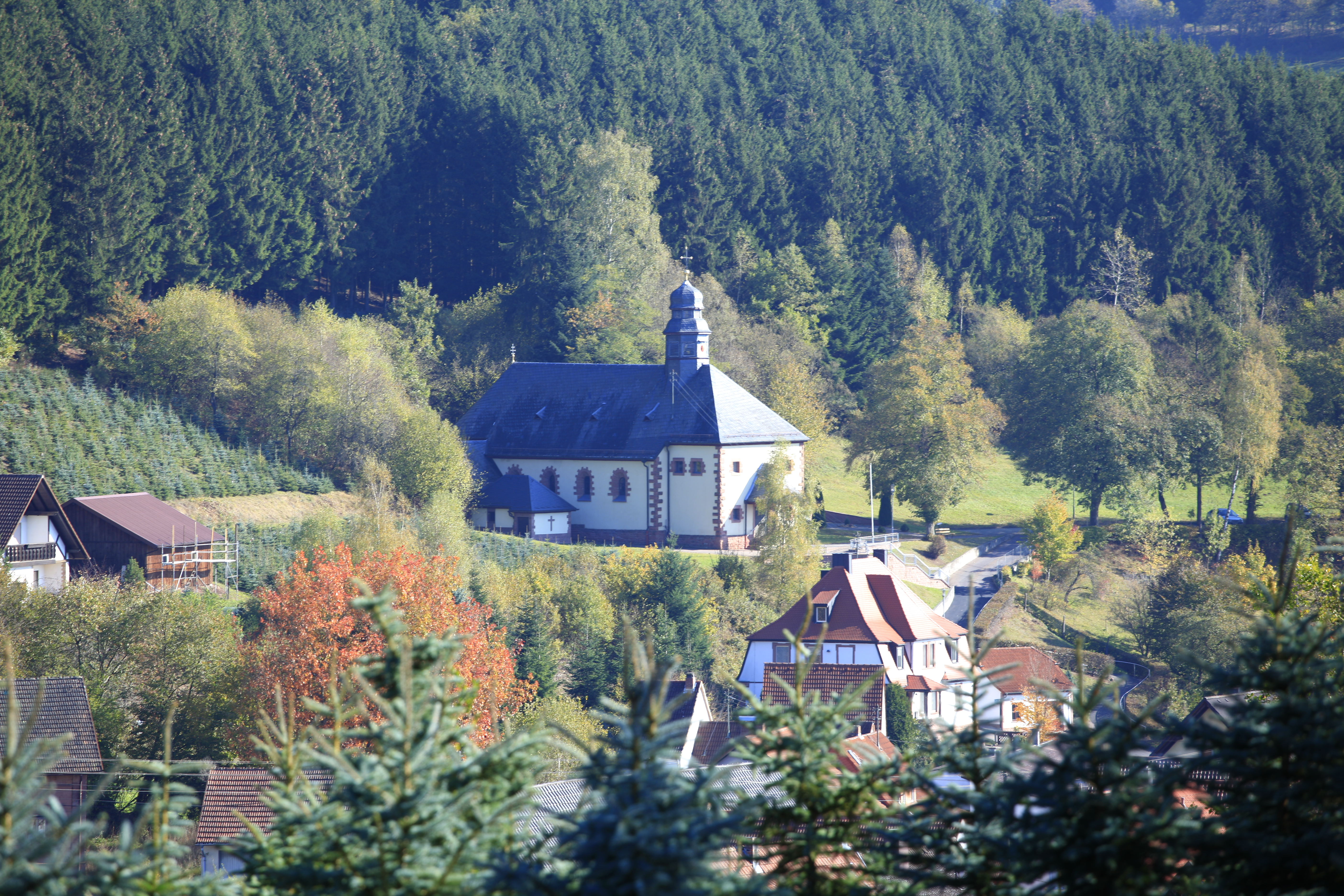 Ansicht von die Kirche von Aura